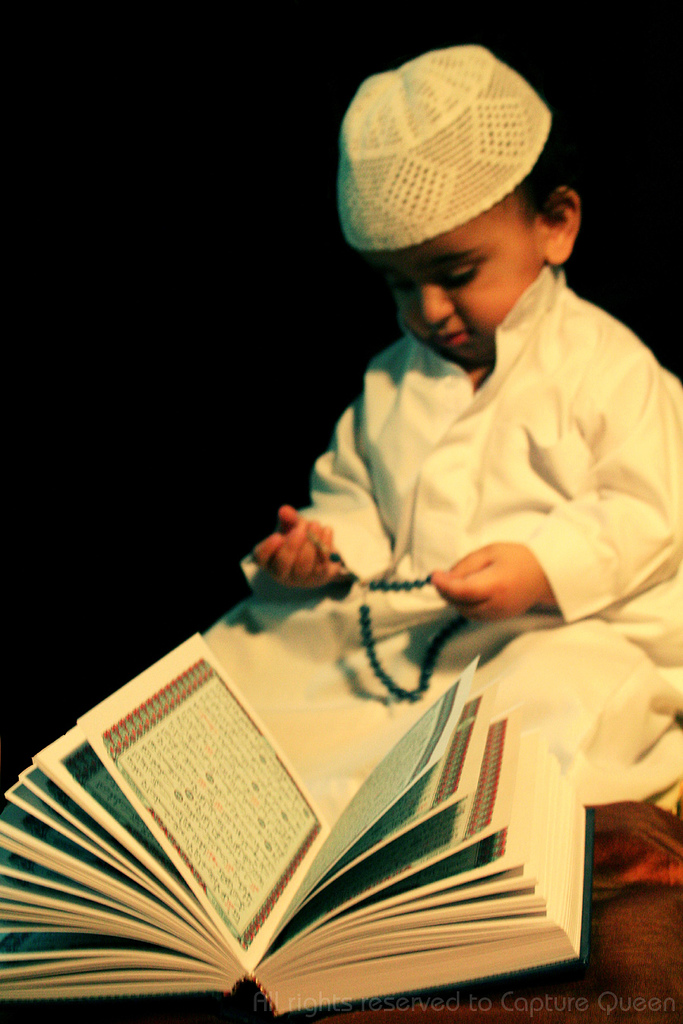 Mashalla and happy ramadan